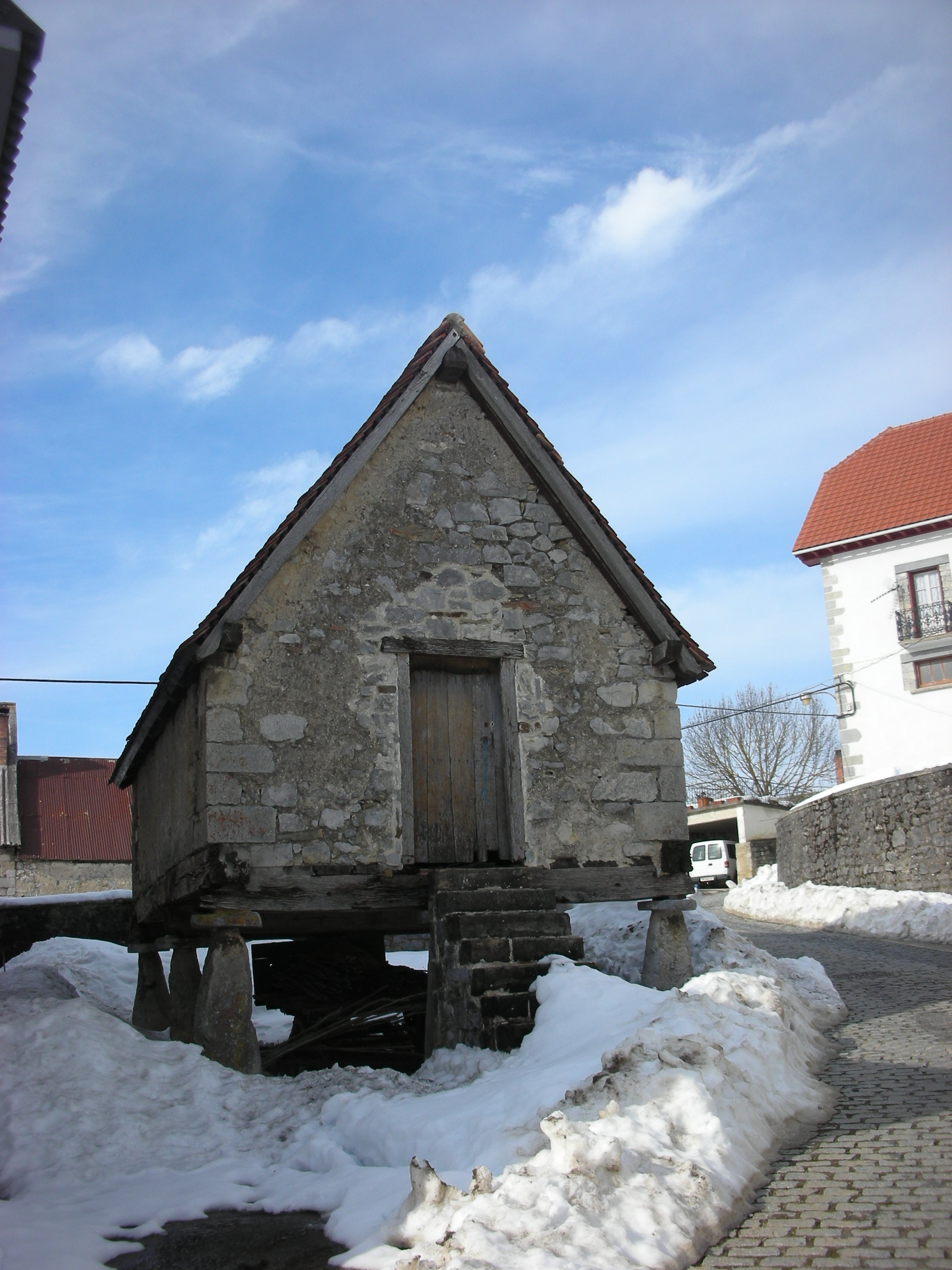 Horreo en el pueblo de Villanueva de Aezkoa (Navarra)